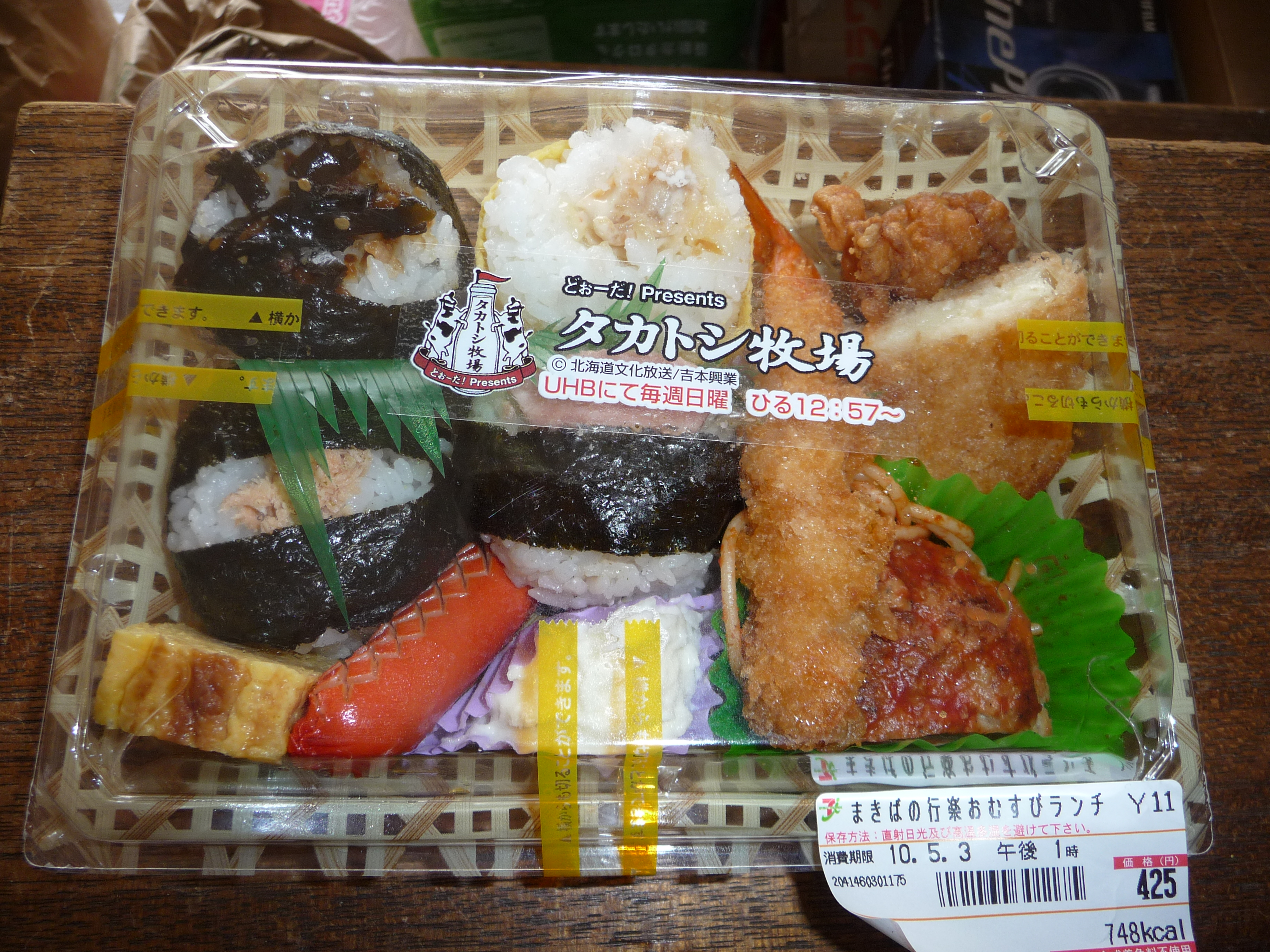 タカアンドトシのどぉーだ!のタカトシ牧場とセブンイレブンの共同企画により限定発売された、『まきばの行楽おむすびランチ』